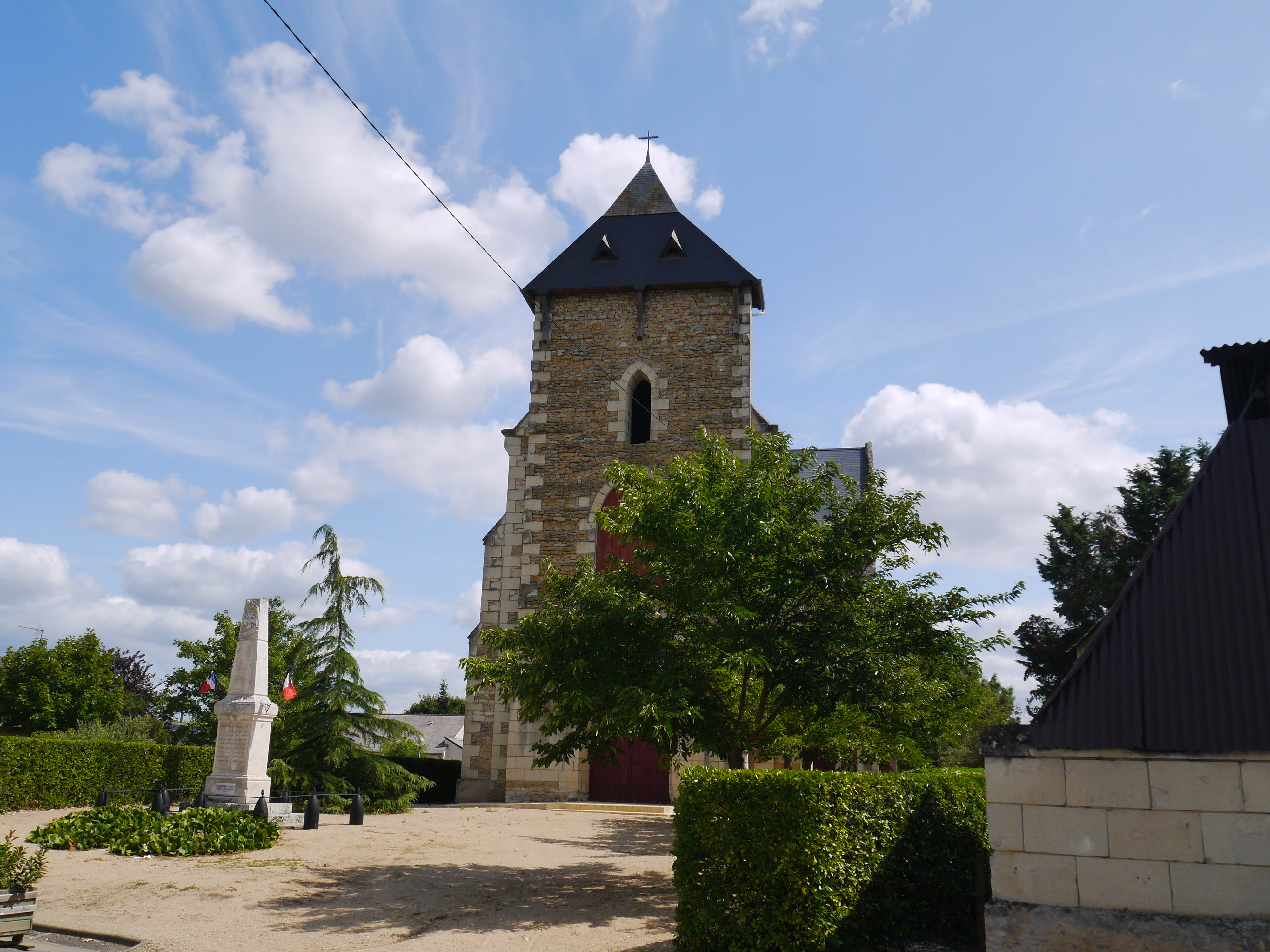 L'église Saint-Just.